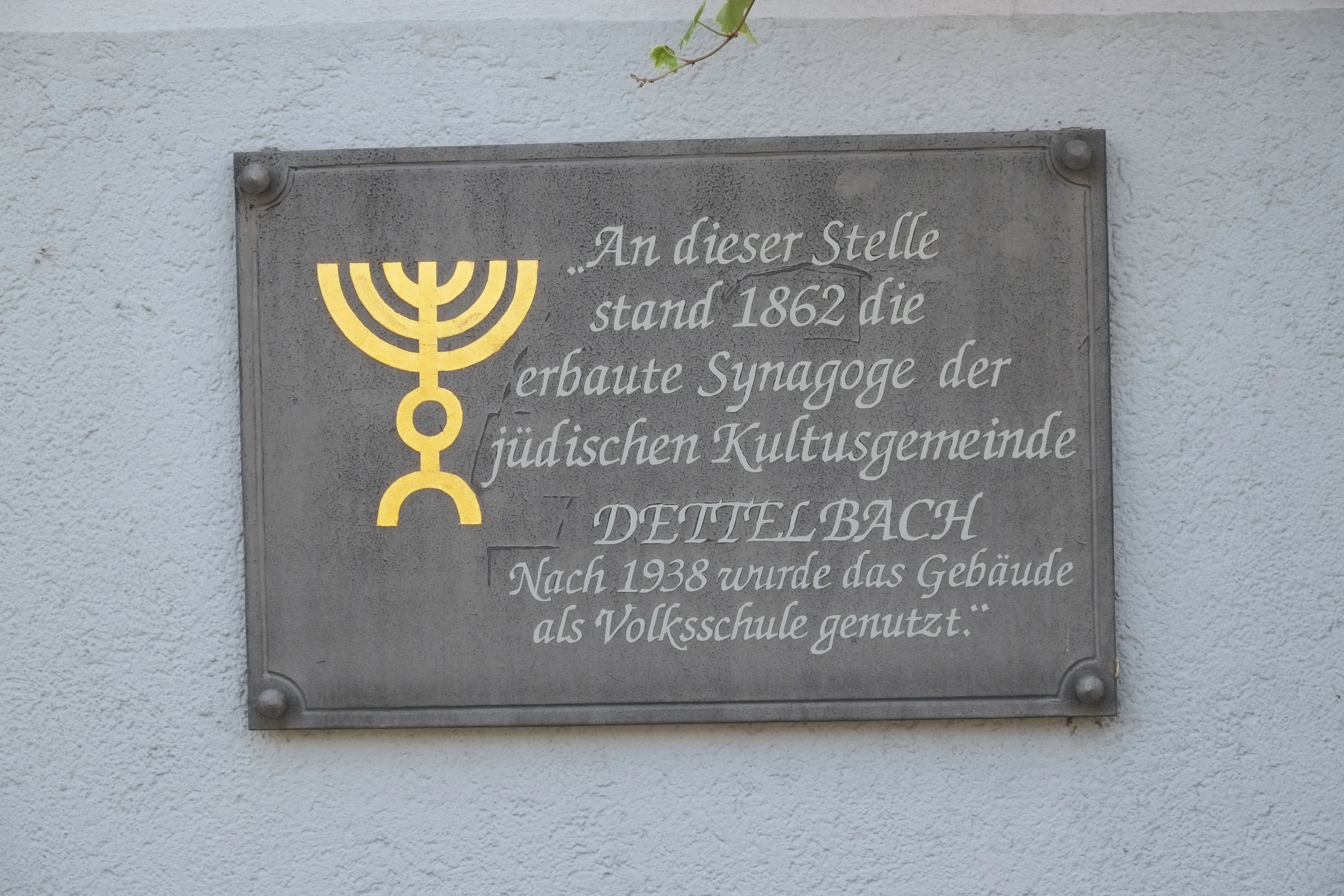 Gedenktafel am Haus Häfnermarkt 4 in Dettelbach im Landkreis Kitzingen (Bayern, Deutschland)